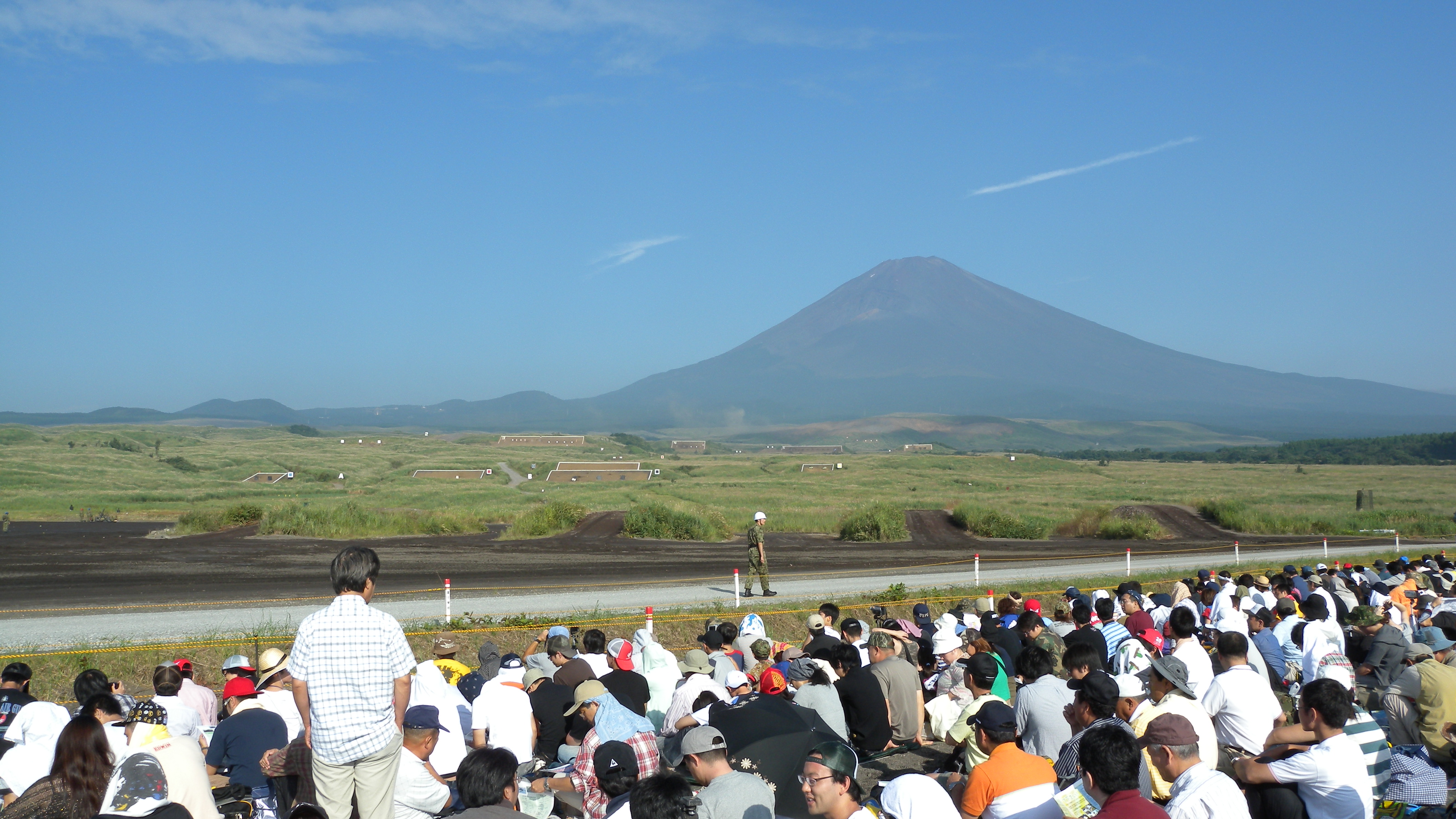 平成21年度富士総合火力演習当日の東富士演習場。